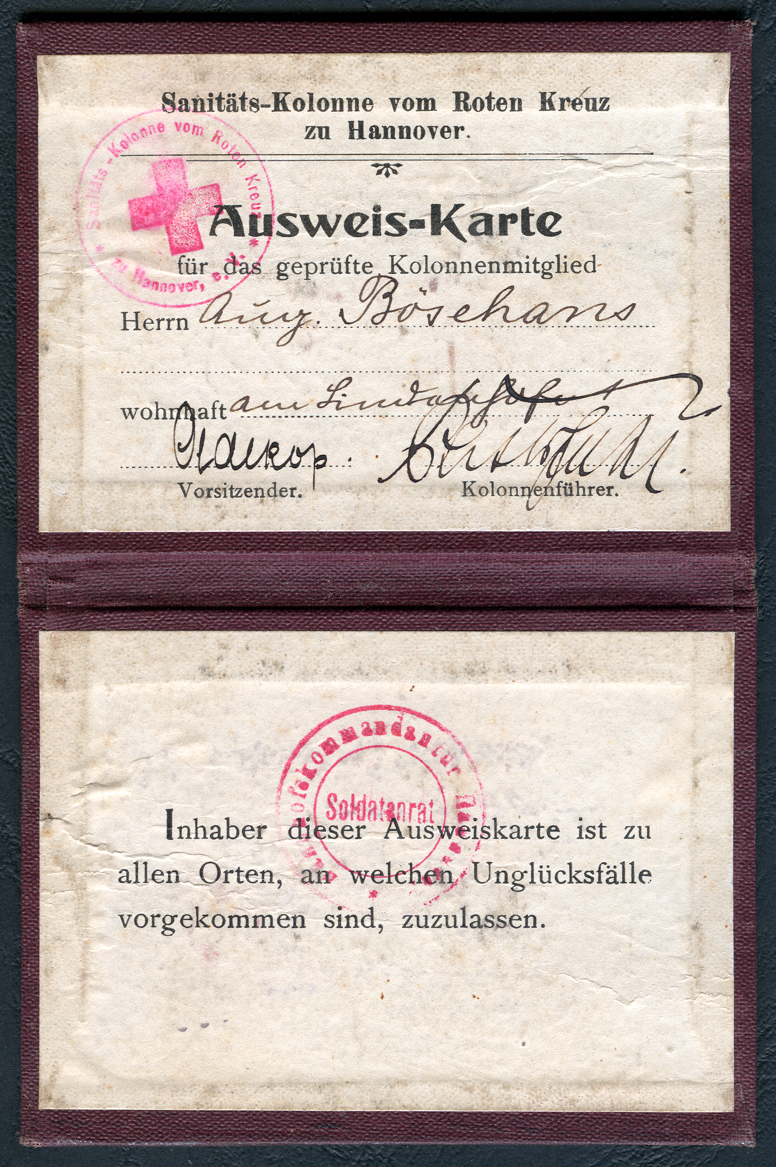 "Ausweis-Karte für das geprüfte Kolonnenmitglied Herrn August Bösehans, wohnhaft am Lindenhof 1"; Sanitäts-Kolonne vom Roten Kreuz zu Hannover. Unterschrift unter anderem vom Vorsitzenden Oldekop. Der "Inhaber dieser Ausweiskarte ist zu allen Orten, an welchen Unglücksfälle vorgekommen sind, zuzulassen." Rote Stempelabdrucke des Vereins der Sanitätskolonne und des "Bahnhofskommandos ... (?) Soldatenrat".